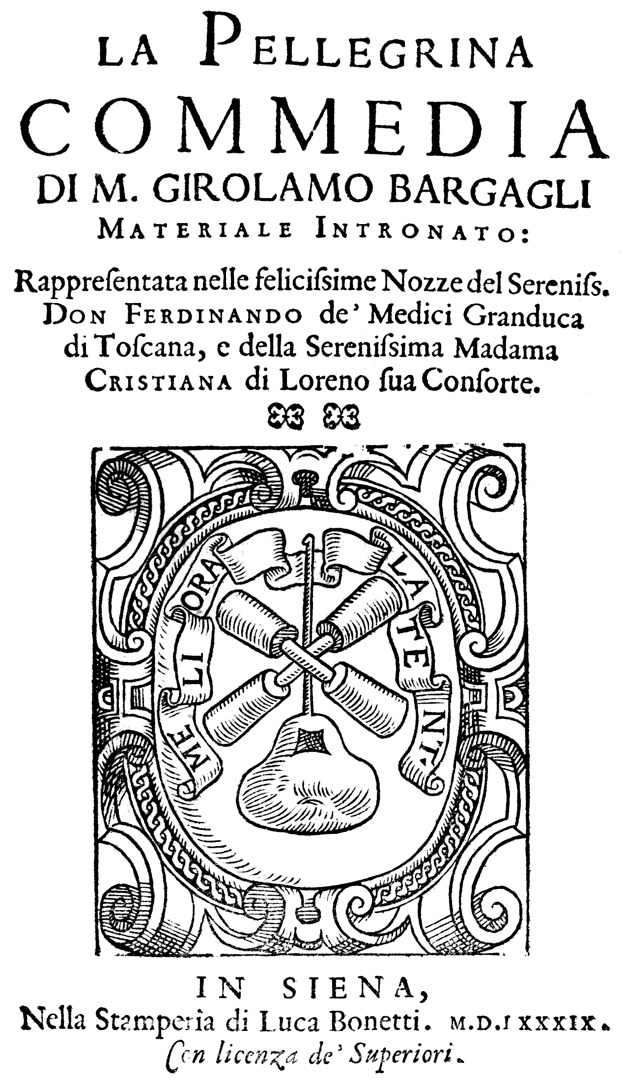 Titelblatt von Girolamo Bargaglis Komödie La Pelligrina (Die Pilgerin) anläßlich der Hochzeit des Medici-Fürsten Großherzog Ferdinand I. mit der Prinzessin Christine von Lothringen im Jahr 1589